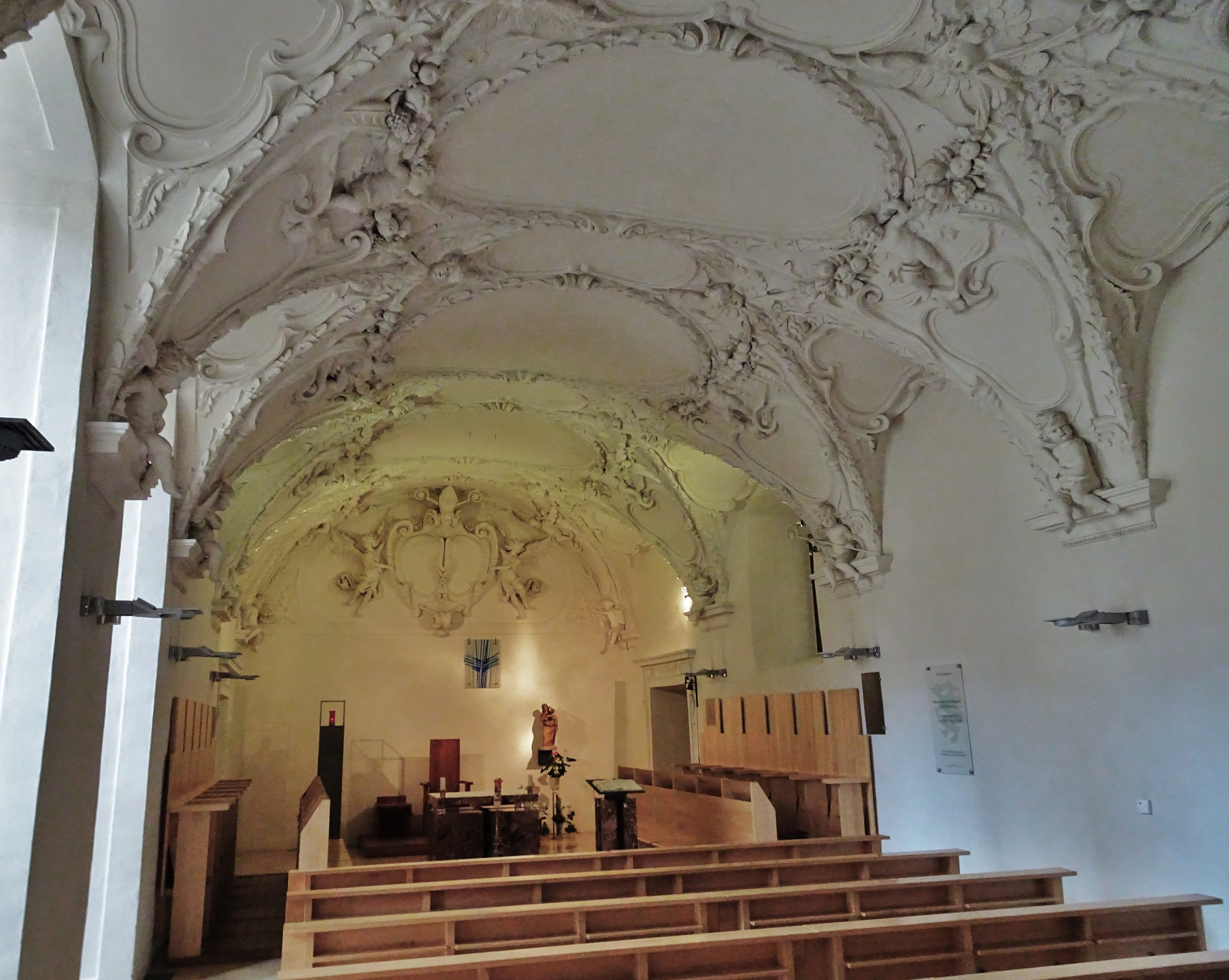 Stift Rein, Blick in den Kapitelsaal